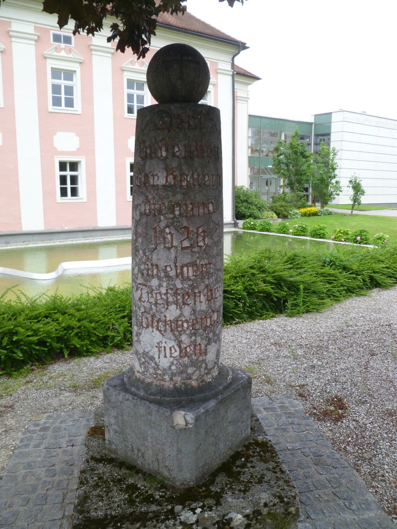 Säule bei Schloss Gschwendt, Inschrift: Dem Gedenken der Bauern die anno 1626 in einem Treffen bei Gschwendt fielen